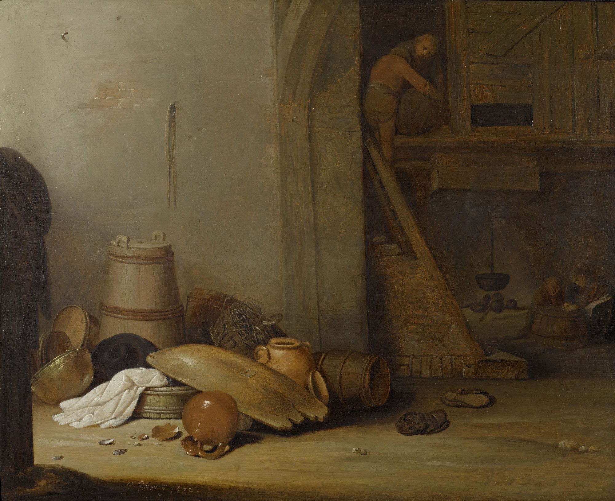 Die Scheune